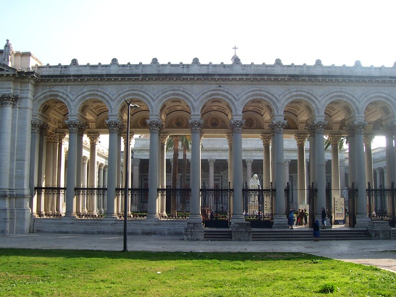 Roma - Basilica di S. Paolo fuori le Mura